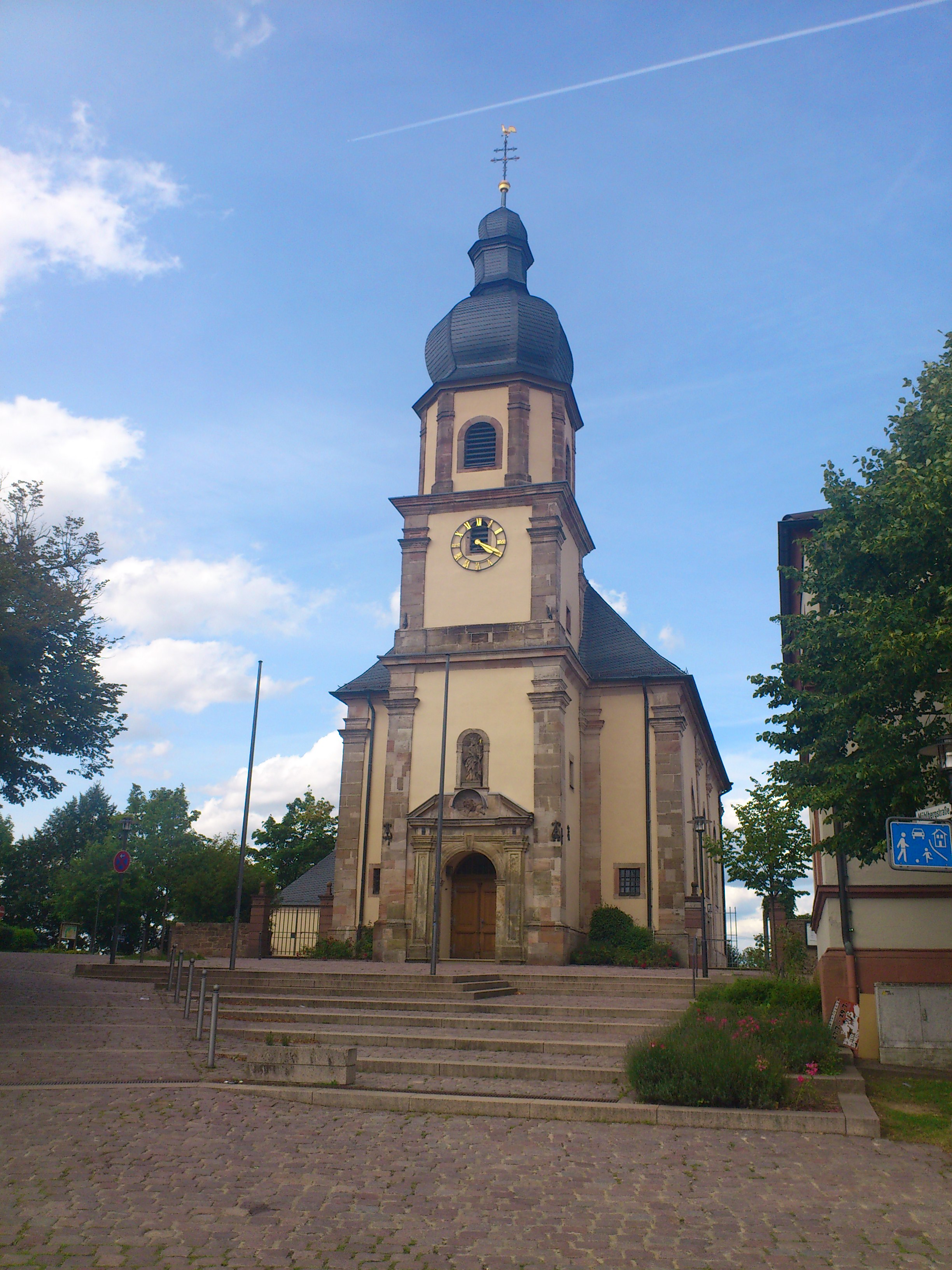 Die katholische Pfarrkirche St. Johannis Enthauptung in Johannesberg (Bayern)